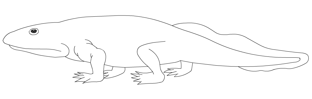 Ichthyostega